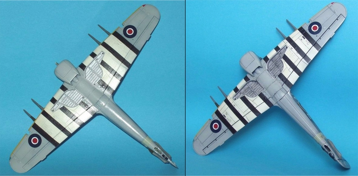 Porównanie wyglądu spodu modelu przed i po wykonaniu washa farbą plakatową